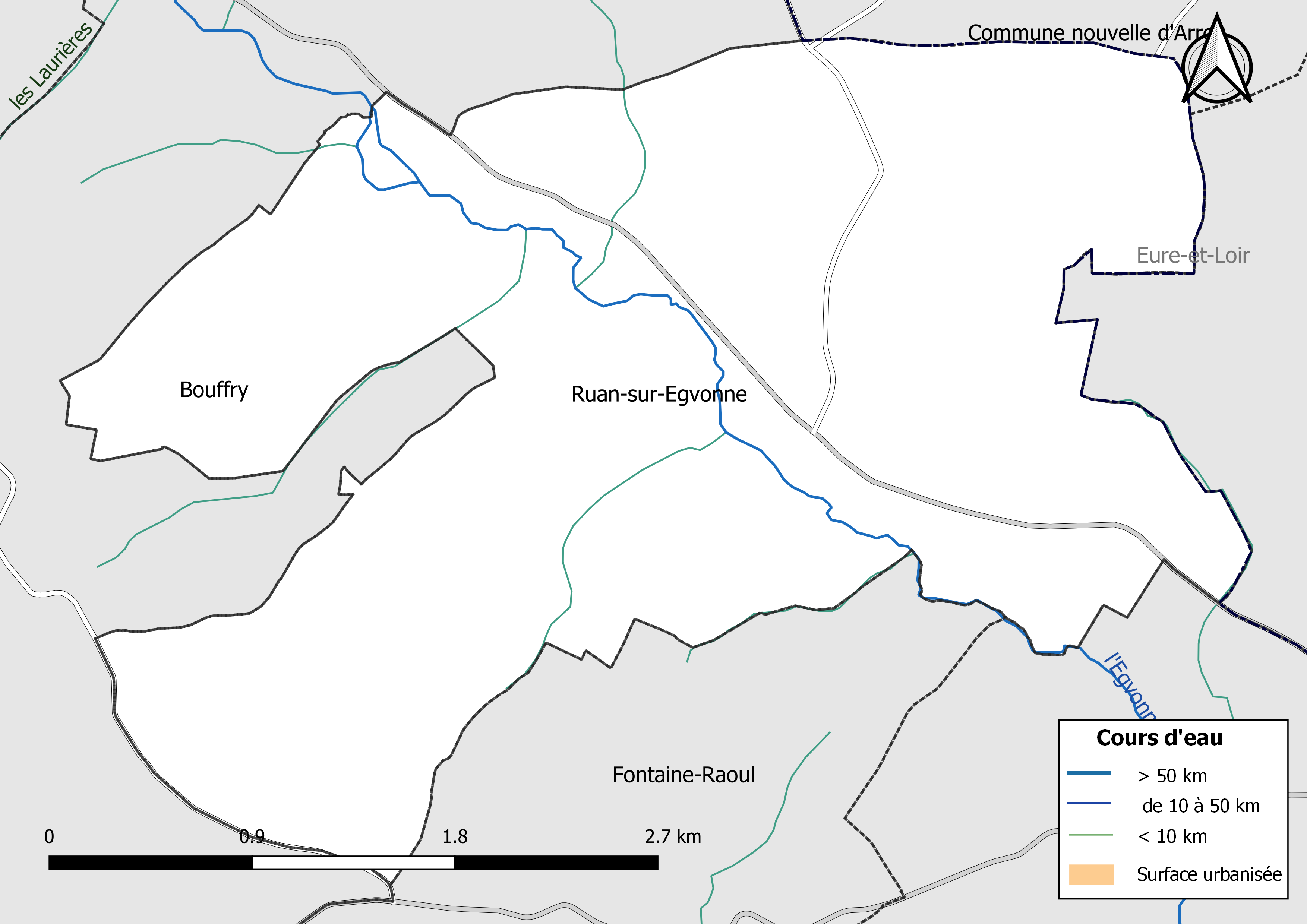 Carte du réseau hydrographique de la commune de Ruan-sur-Egvonne (Loir-et-Cher, France).